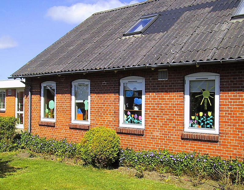 Vammen børnehave